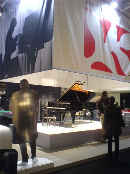 La sedia presentata al Salon du Meuble - Parigi 2007